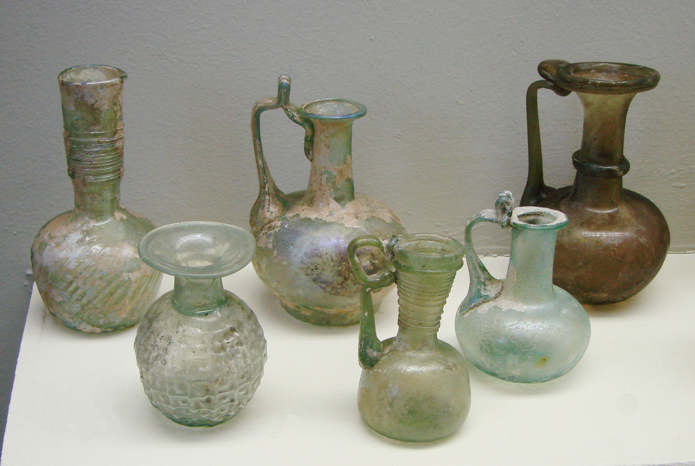 Verrerie gallo-romaine,2ème s.+ JC.Musée Saint-Remi à Reims, Marne, France.